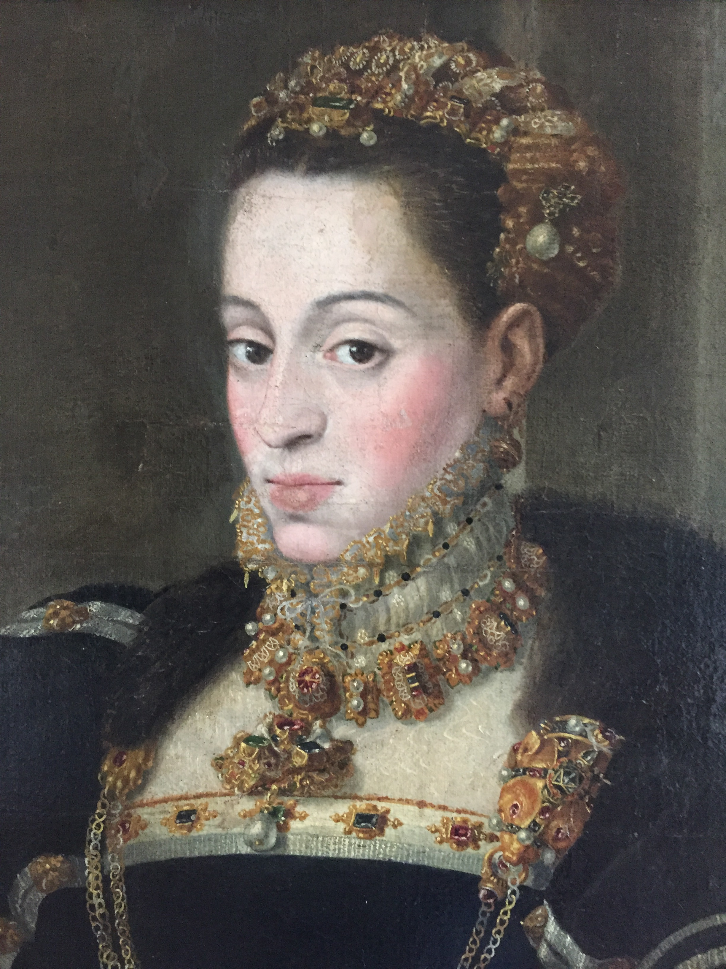 Portrét Margarity kolem roku 1555, zámek v Nelahozevsi.